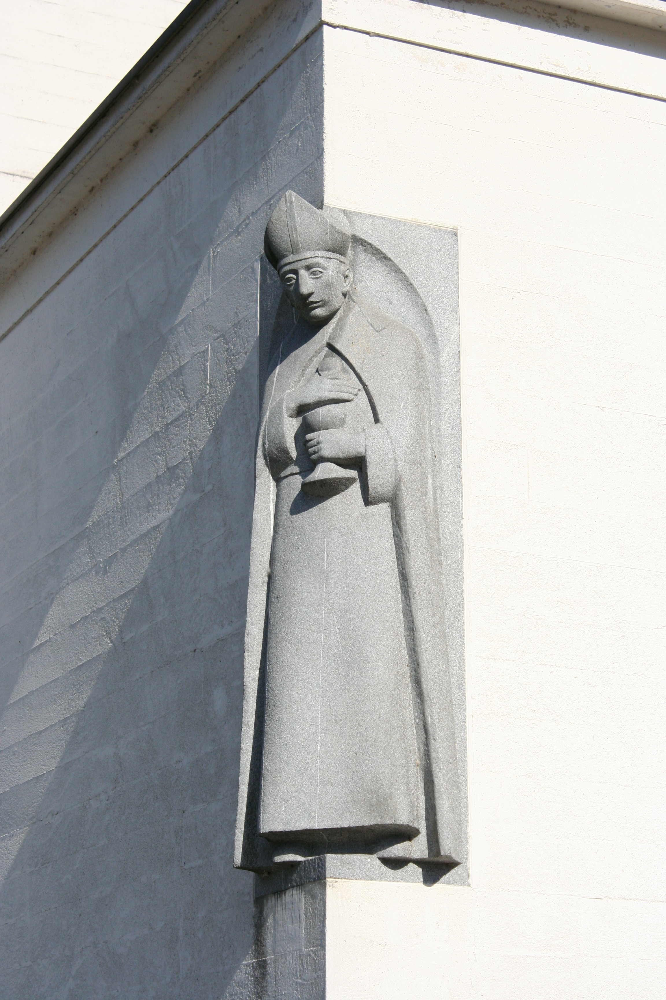 Römisch-katholische Pfarrkirche Sankt Karl Luzern, Karl-Borromäus-Statue von Karl Bick